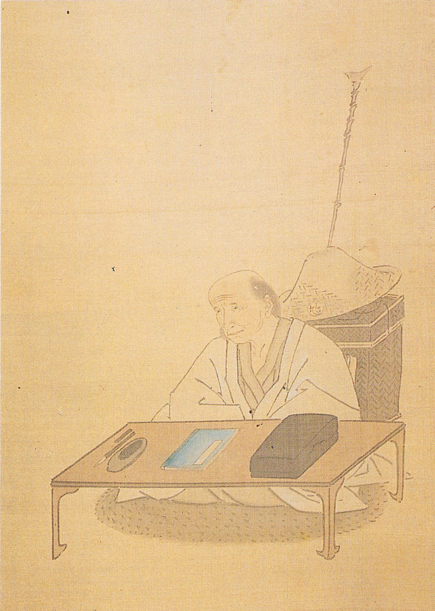 小谷三志の肖像。